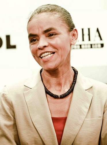 Marina Silva em julho de 2010.